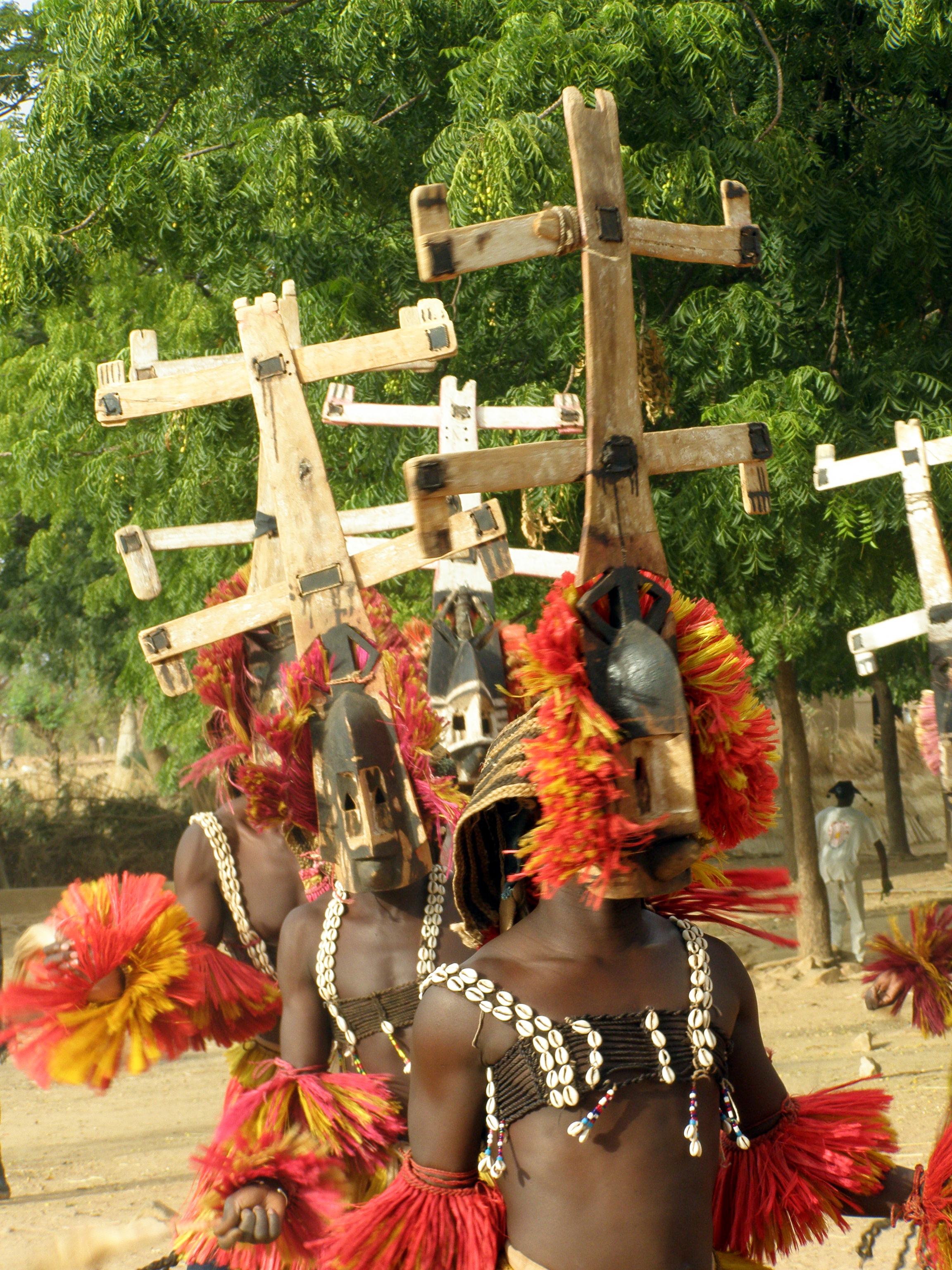 Masques Kanaga lors d'une "danse des masques" en pays Dogon - Village de Sangha - Cercle de Bandiagara - Mali